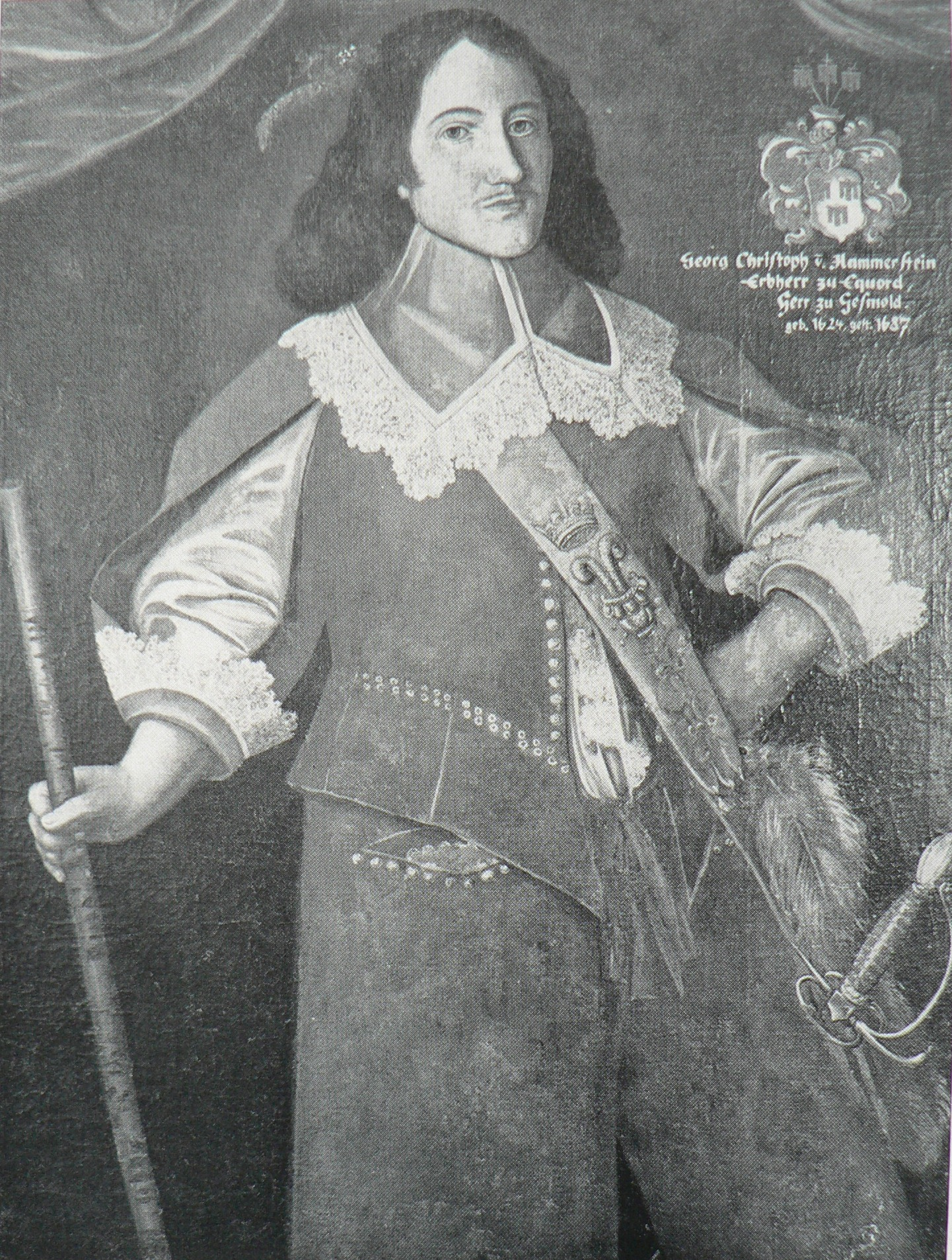 Georg Christoph von Hammerstein, Schlossherr auf Schloss Gesmold (Ölbildnis um 1660)